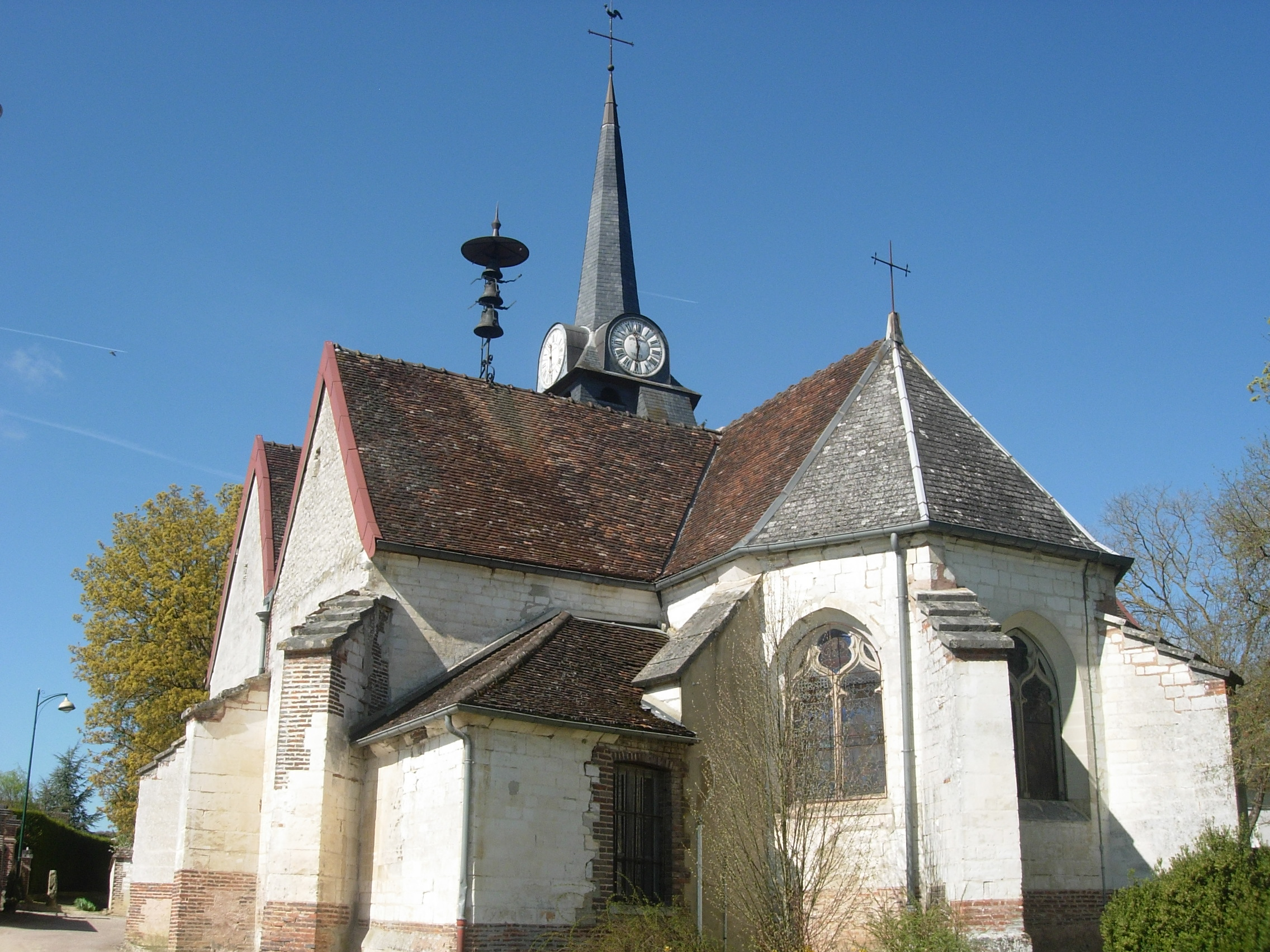 Eglise de Bucey-en-Othe